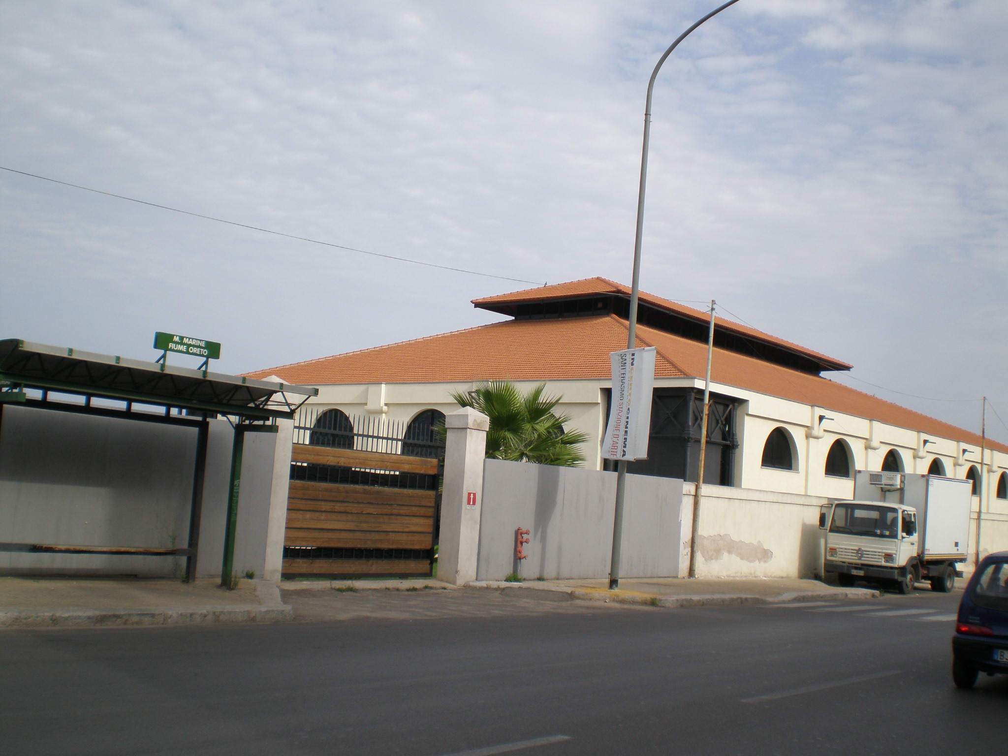 Sono l'auotre rilascio tutti i diritti